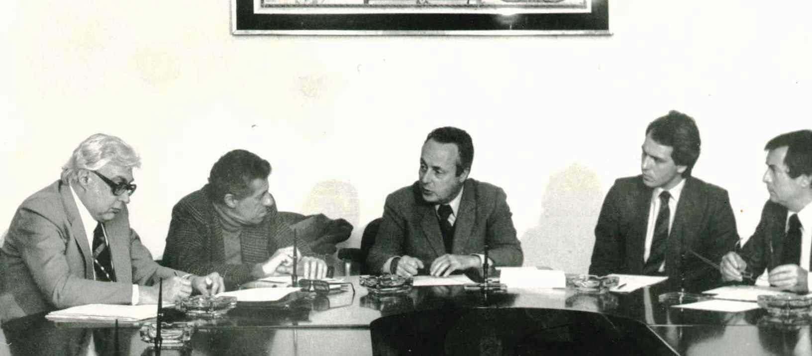 Gli scrittori Luigi Silori (1° da sin.), Walter Mauro (2° da sin.), Giorgio Bassani (al centro), il calciatore Roberto Bettega, il critico Giuseppe Brunamontini. Rome, Italy, 1974